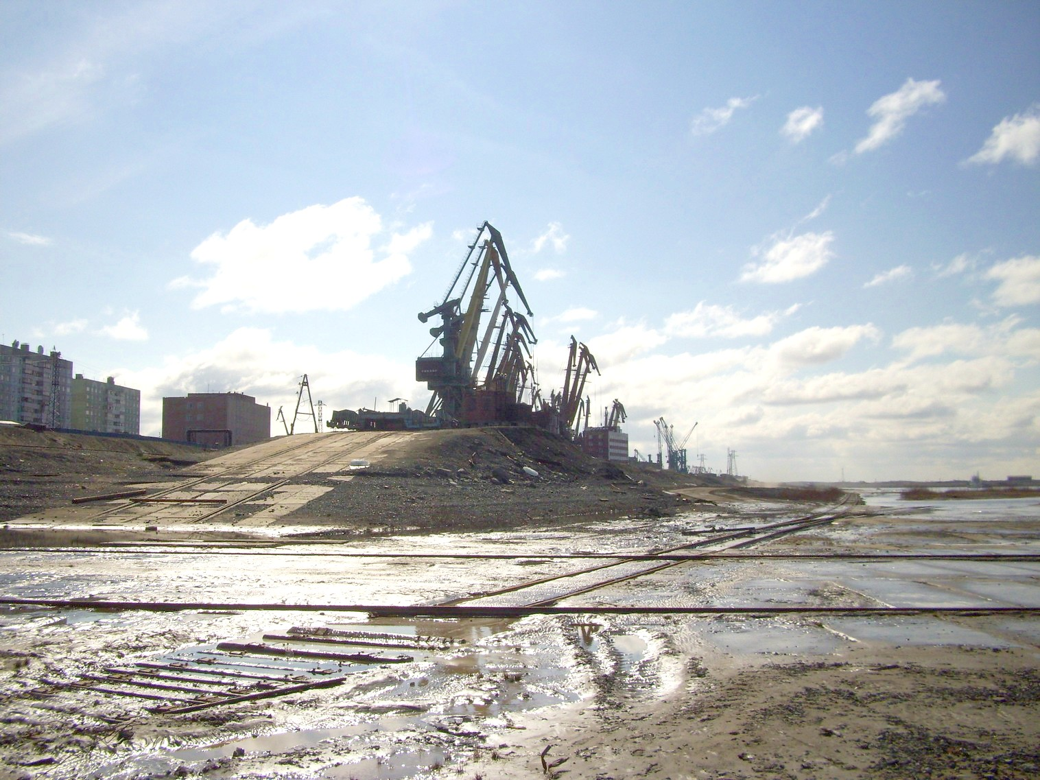 Железная дорога в порту Дудинка